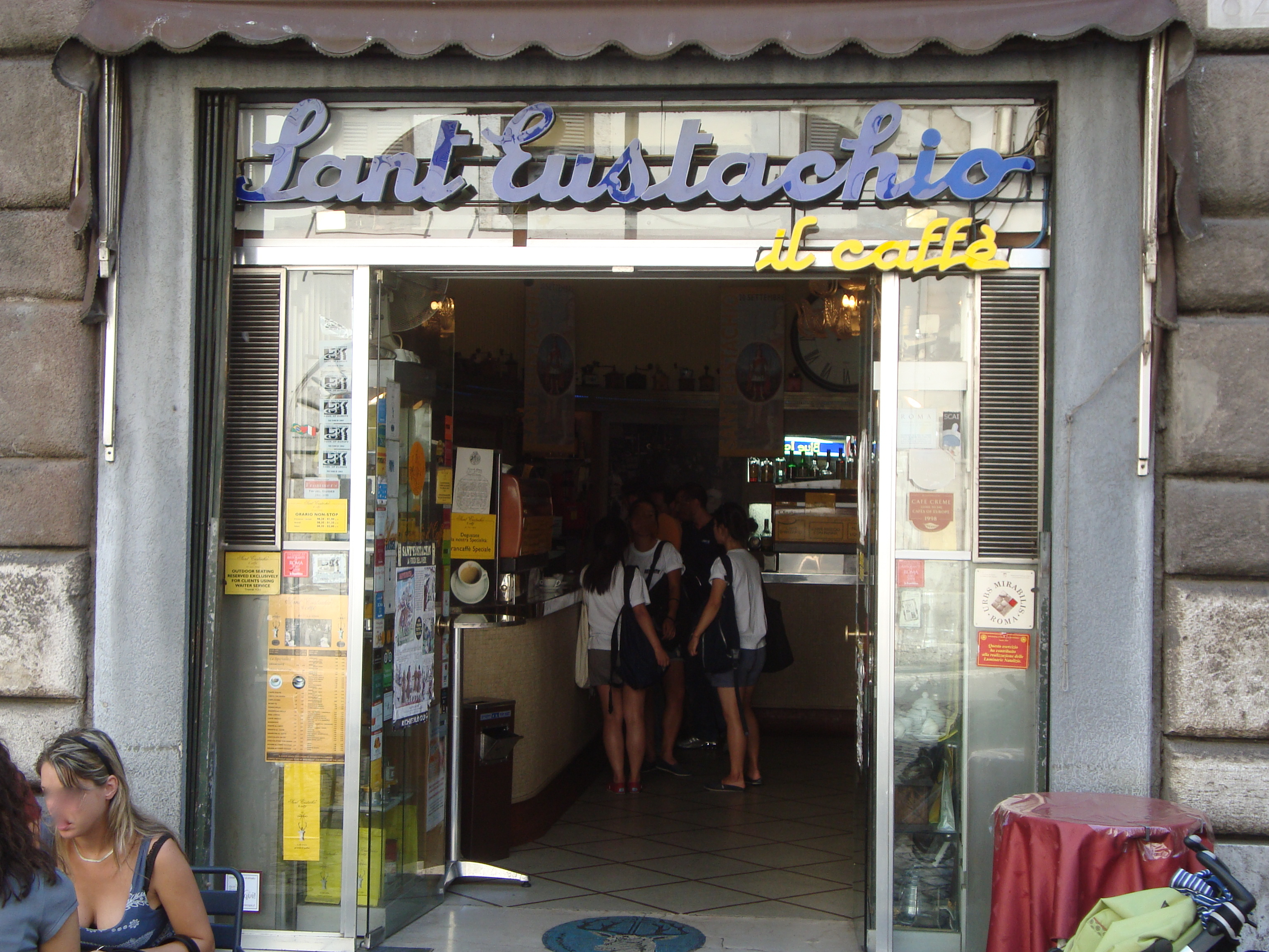 Le café Sant'Eustachio à Rome, célèbre café italien fondé en 1938